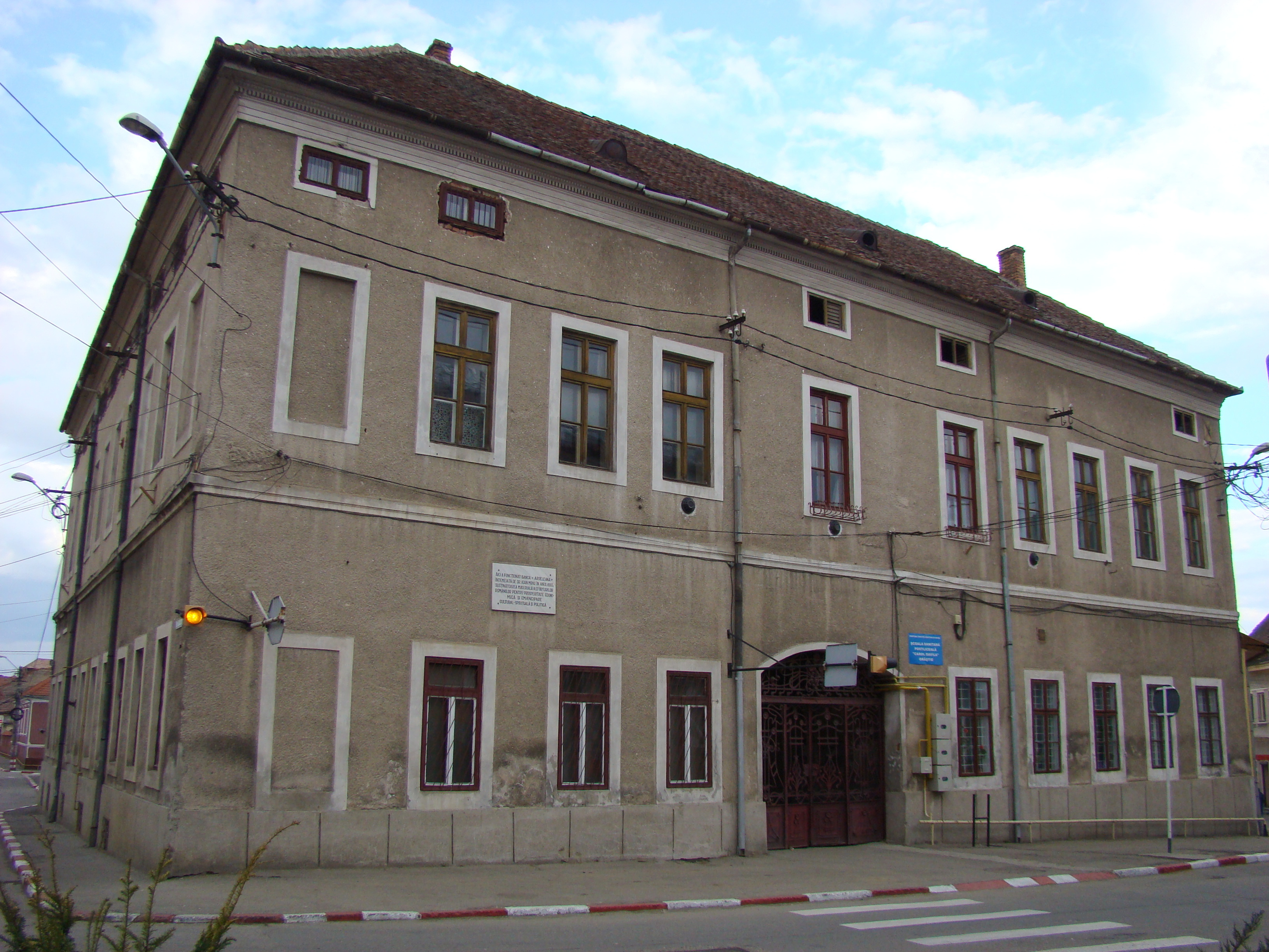 Banca Ardeleană